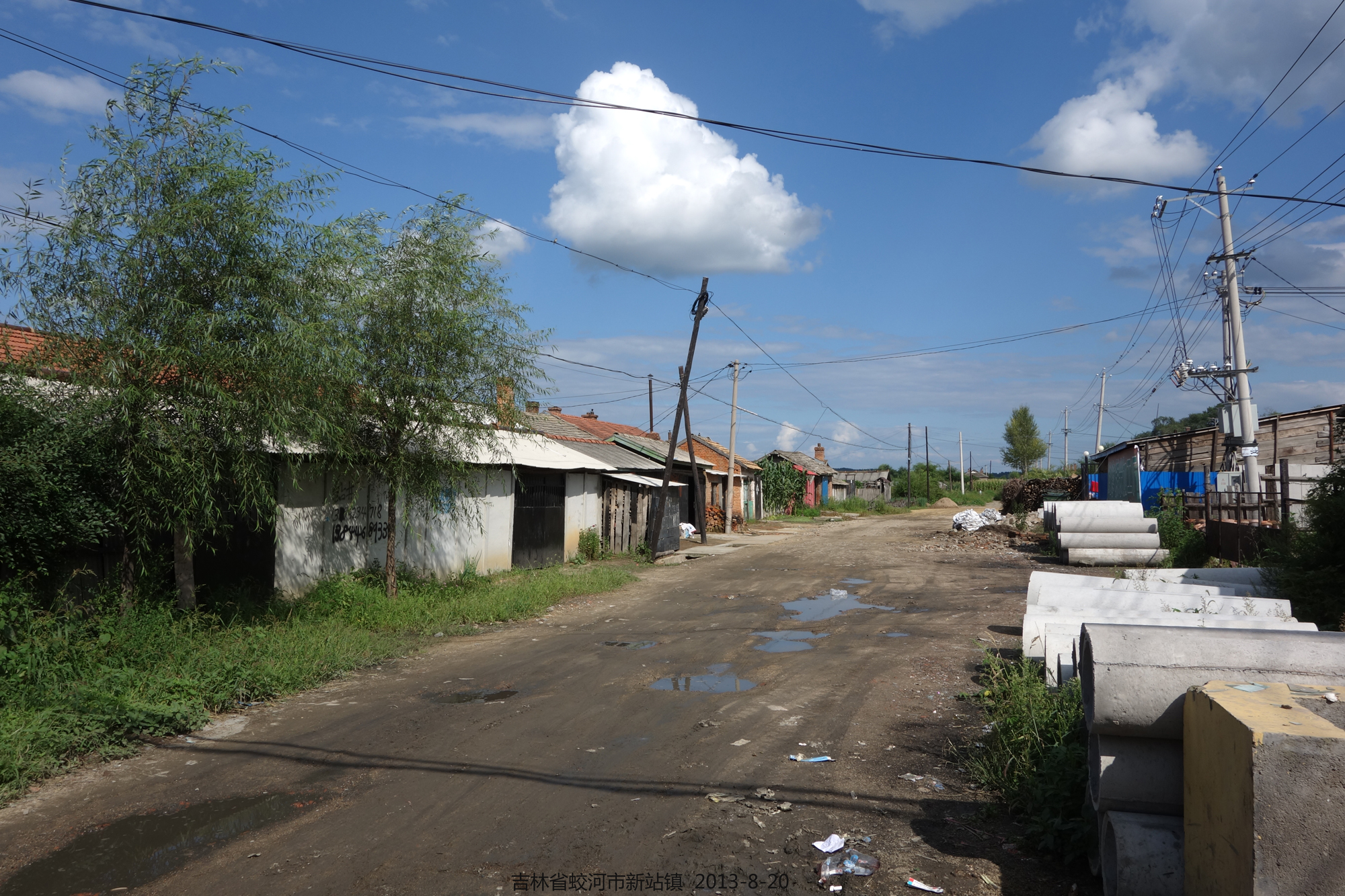 新站